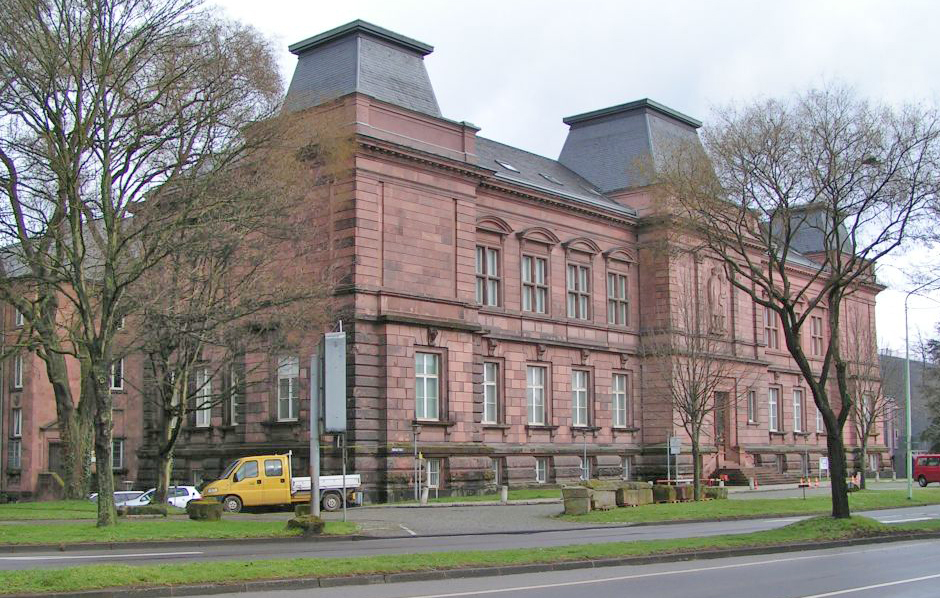 Rheinesche Landesmusée Tréier